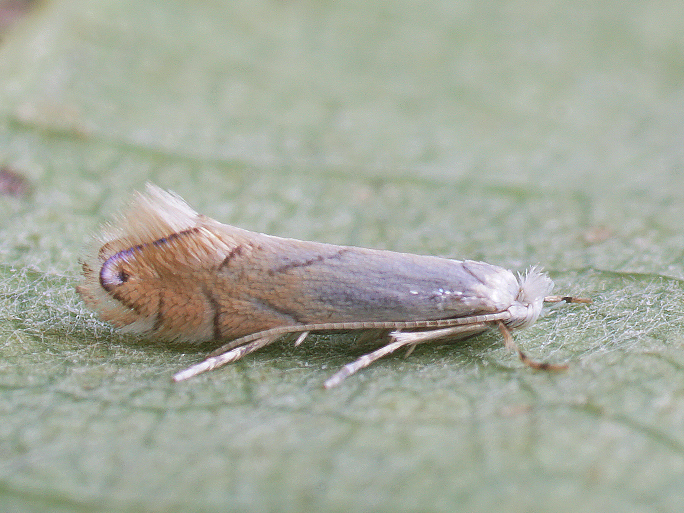 Exemplar found: Russia, Moscow Oblast, Odintsovsky District, near village Pestovo, 02.07.2018, on common oak (Quercus robur), days МО, Одинцовский р-н, окрестности деревни Пестово, 02.07.2018, на дубе, днём